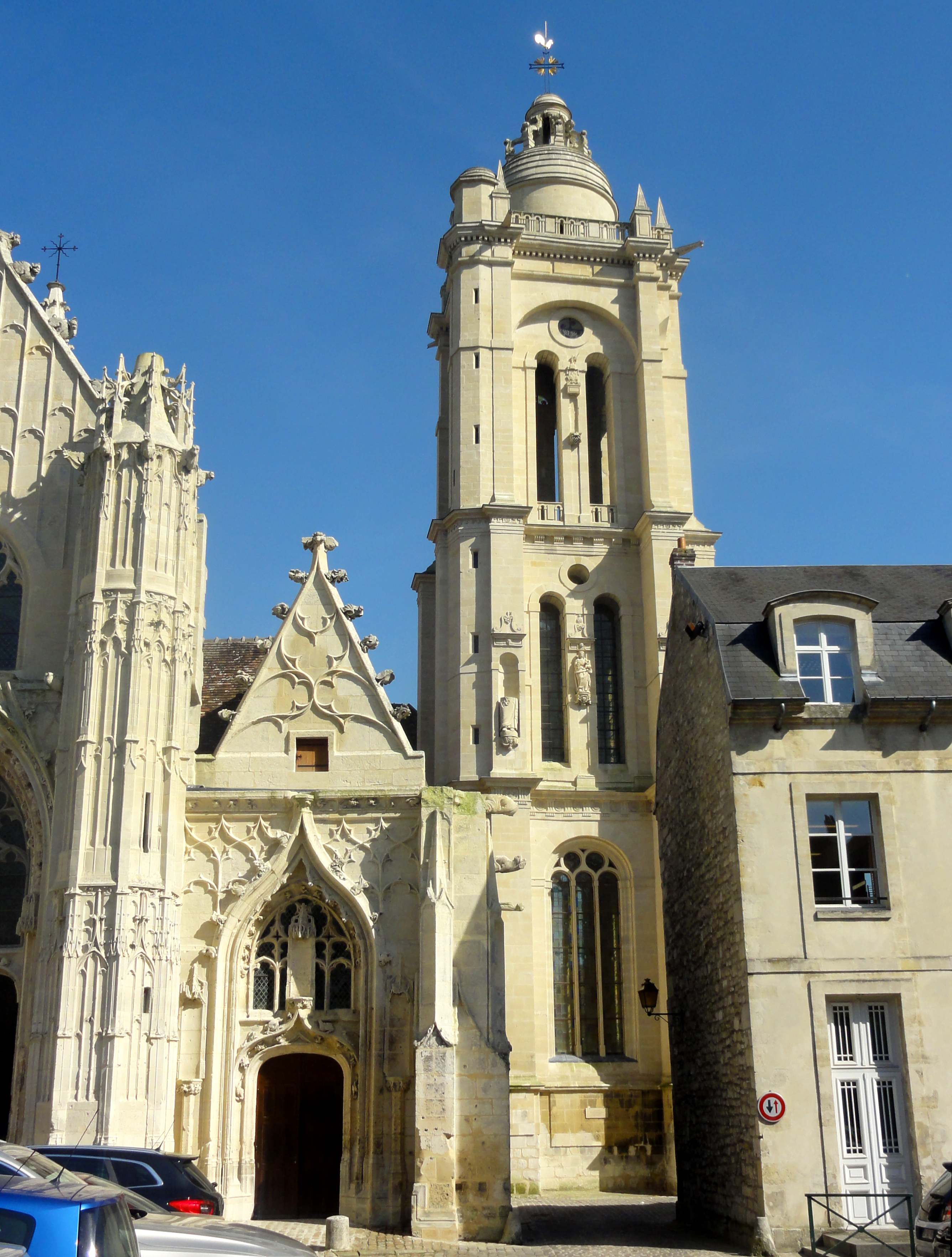 Église Saint-Pierre de Senlis - voir le titre du fichier.